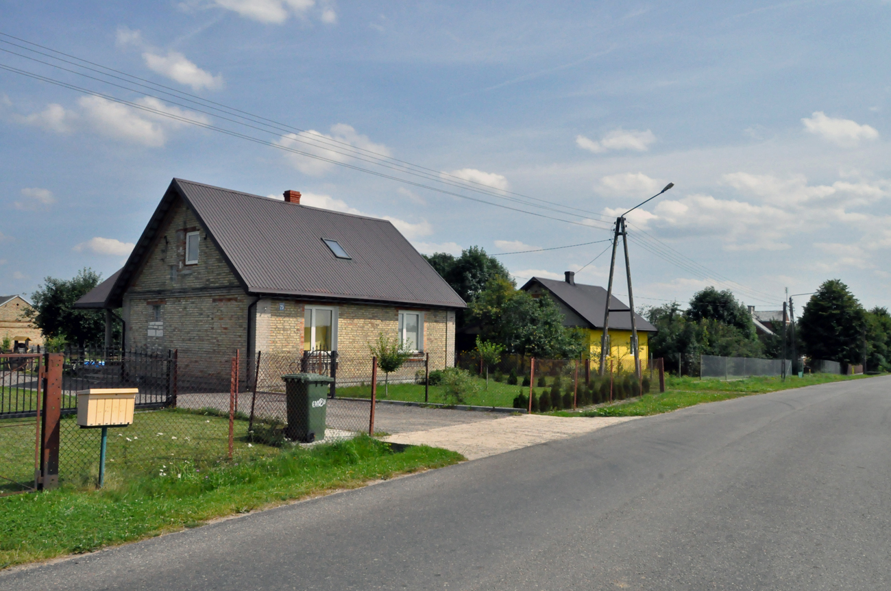 Droga we wsi